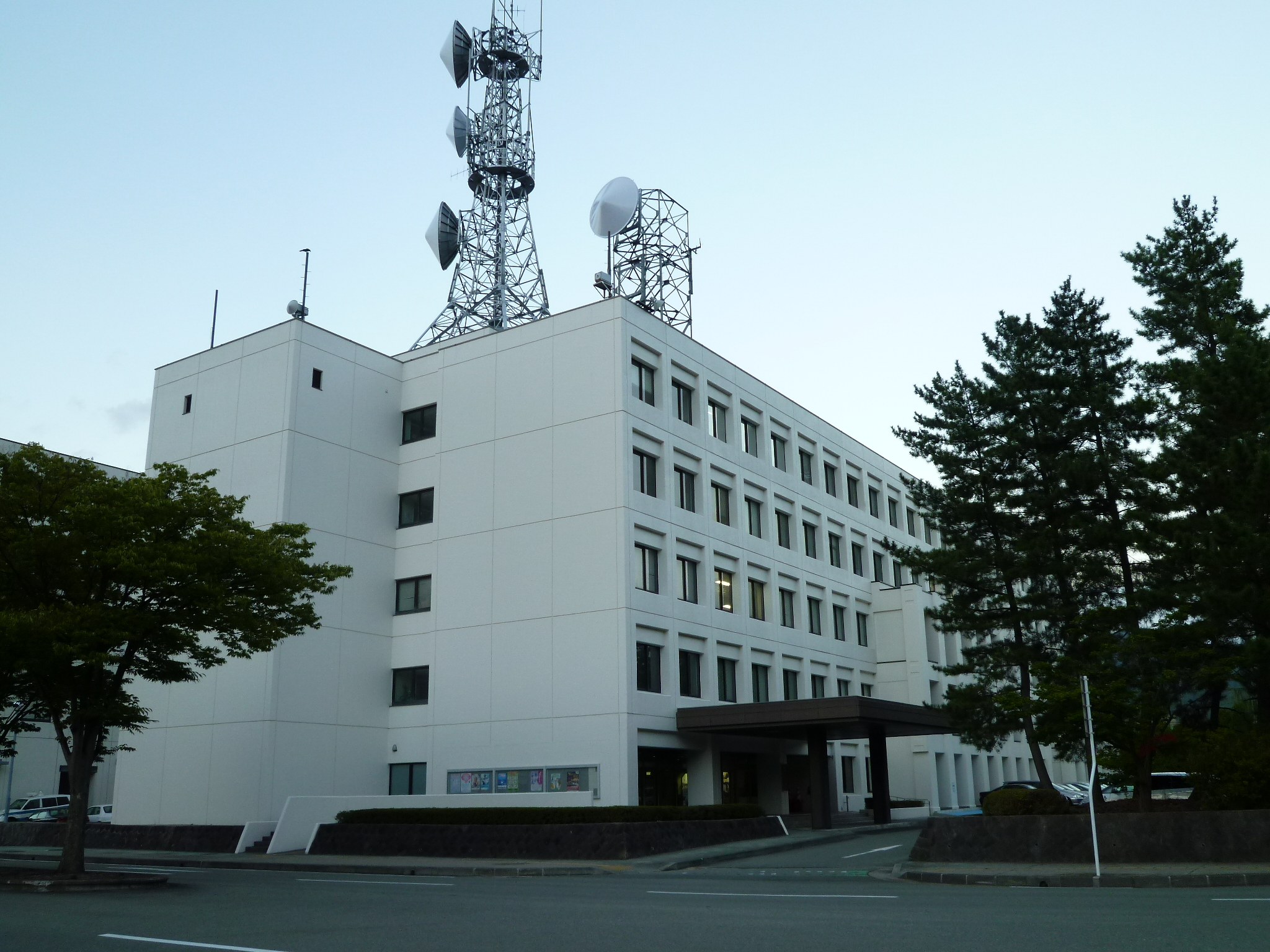 山形県警察本部（山形県山形市）